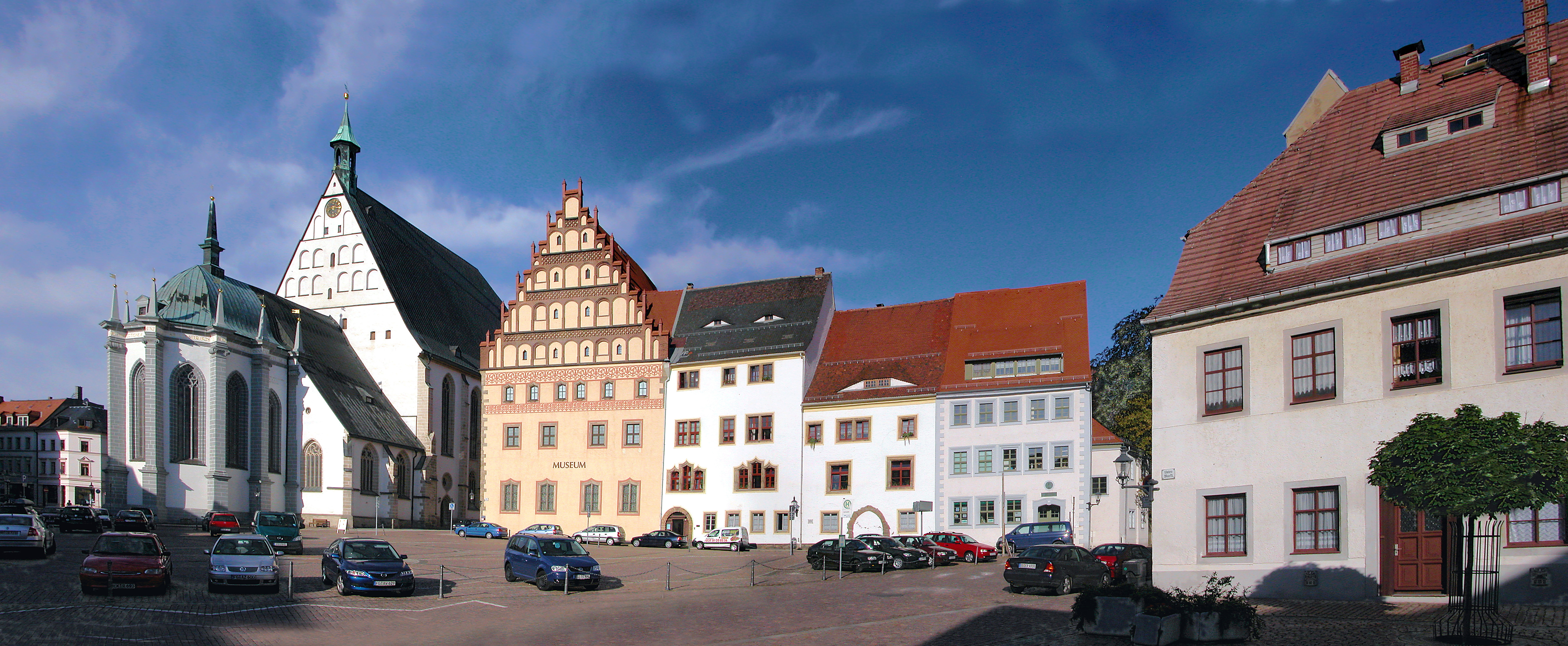 03.08.2006 09599 Freiberg/Sachsen, Untermarkt: Dom St. Marien (Dom Unserer Lieben Frauen, spätgotisch, vollendet 1512); Domherrenhof (1480/85, Museum); Superintendentur (ehem. Dechanei, zwei Gebäude, linkes von vor 1500); Haus Untermarkt 2 / Ecke Geschwister-Scholl-Straße. [DSCN10801-10803.TIF]20060803025MDR.JPG(c)Blobelt